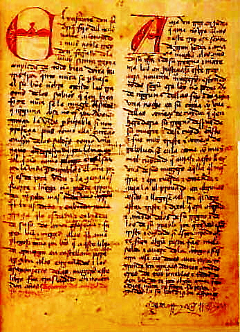 Página del manuscrito del Sendebar (siglo XIII, España)